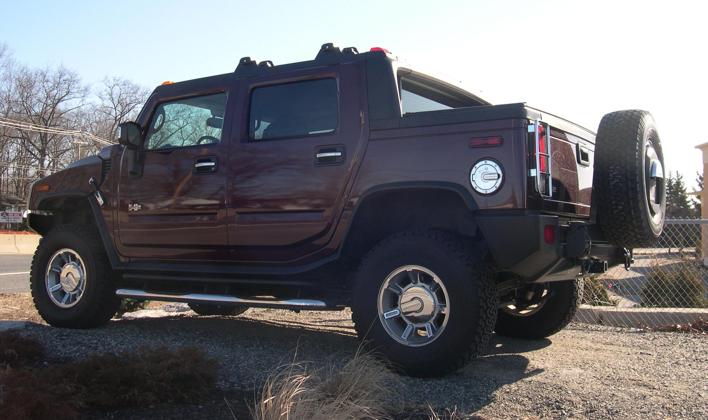 Hummer H2 SUT (pickup)